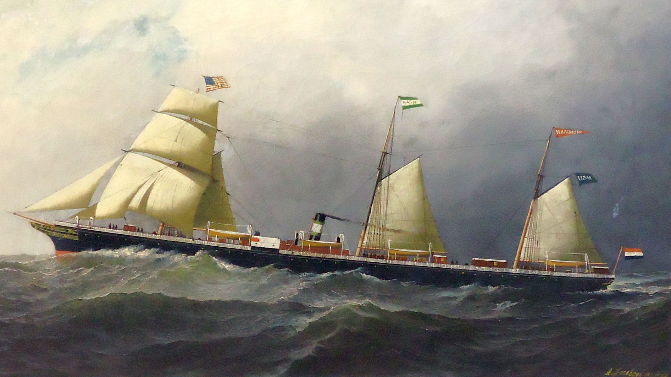 Stoomschip de W.A. Scholten, 1878